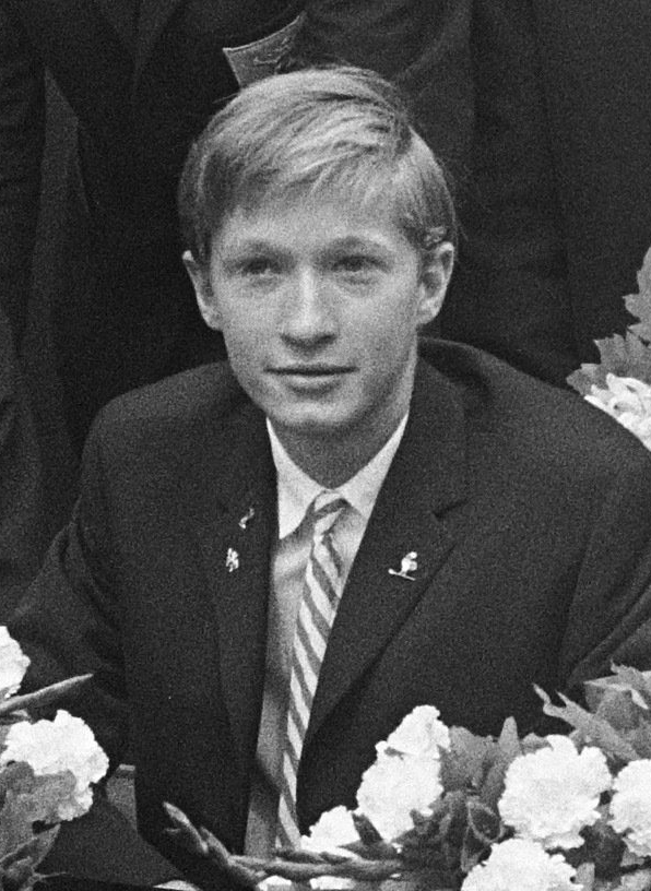 Aankomst van de Nederlandse roeiers op Schiphol na afloop van het wereldkampioenschap roeien te Bled in het voormalig Joegoslavië. Zittend: De Haan